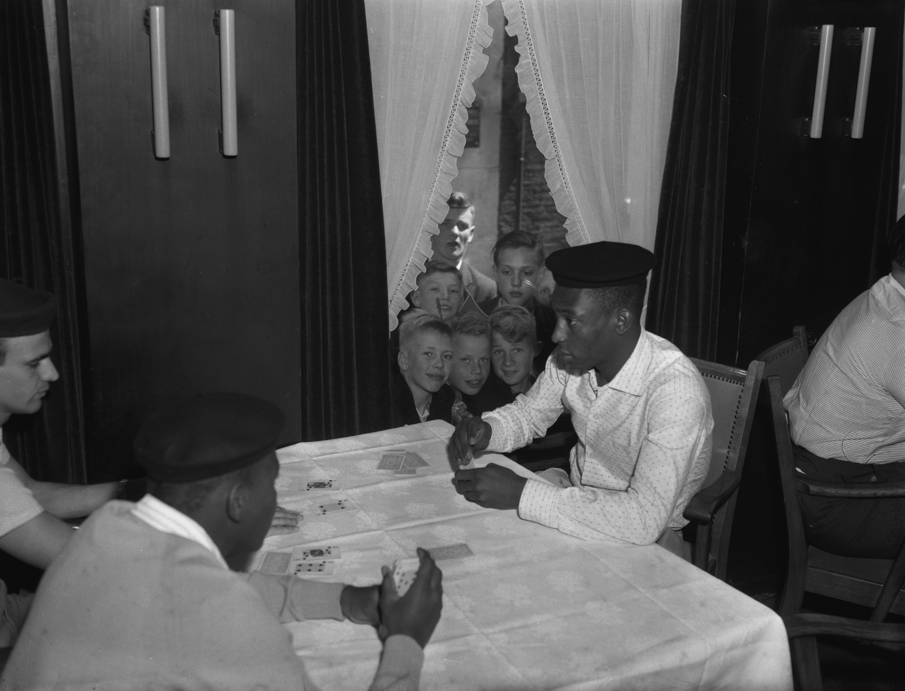 Collectie / Archief : Fotocollectie Anefo Reportage / Serie : [ onbekend ] Beschrijving : Spelers van de F. C. Santos in Groningen, Pele tijdens het kaarten Datum : 3 juni 1959 Fotograaf : Rossem, Wim van / Anefo Auteursrechthebbende : Nationaal Archief Materiaalsoort : Negatief (zwart/wit) Nummer archiefinventaris : bekijk toegang 2.24.01.04 Bestanddeelnummer : 910-4198